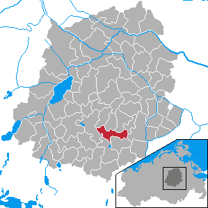 Wolde, Landkreis Demmin, Mecklenburg-Vorpommern